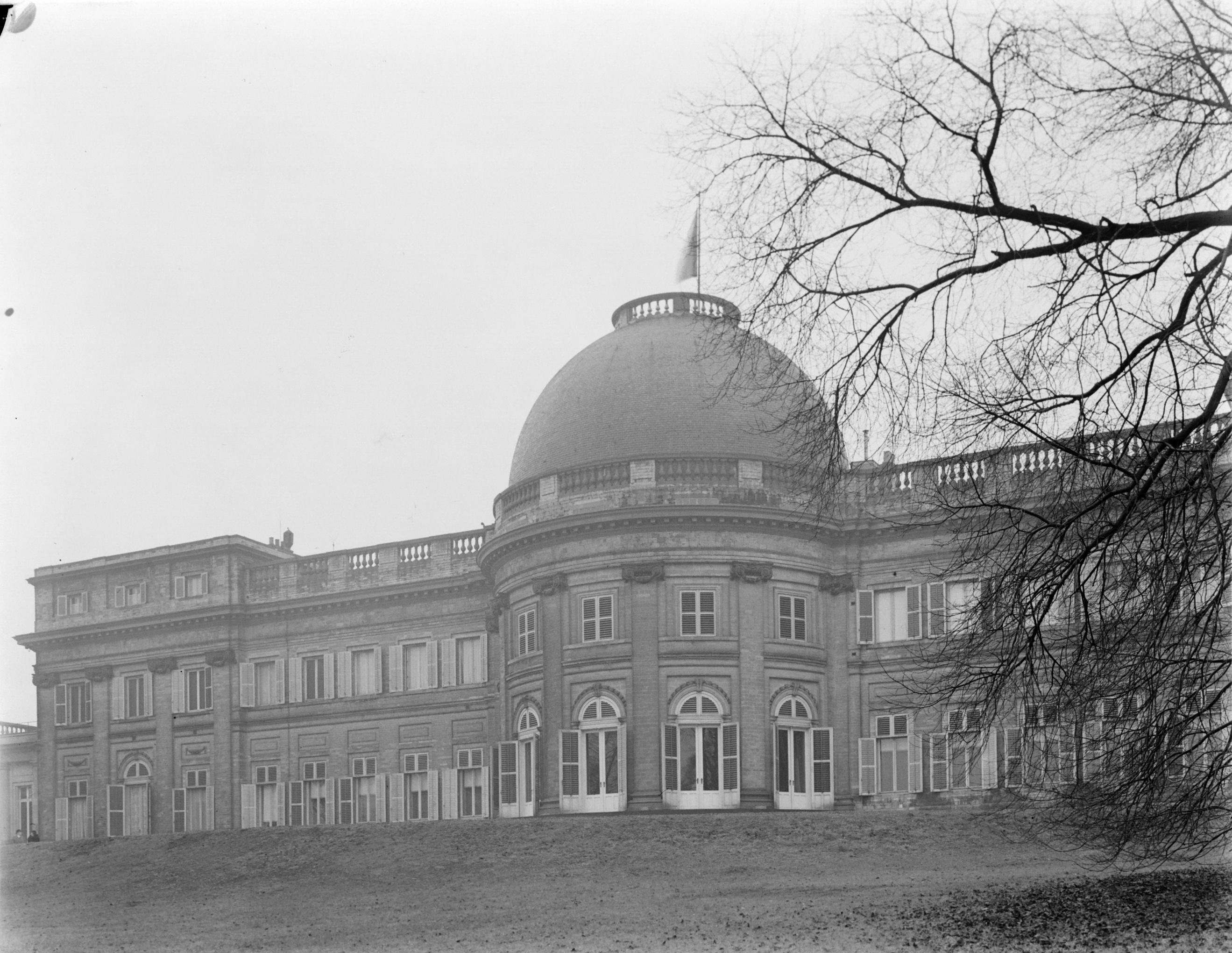 Collectie / Archief : Fotocollectie Van de Poll Reportage / Serie : Koningshuis België Beschrijving : Het paleis te Laken Datum : 1934 Locatie : België, Brussel Trefwoorden : paleizen Fotograaf : Poll, Willem van de Auteursrechthebbende : Nationaal Archief Materiaalsoort : Glasnegatief Nummer archiefinventaris : bekijk toegang 2.24.14.02 Bestanddeelnummer : 252-1586